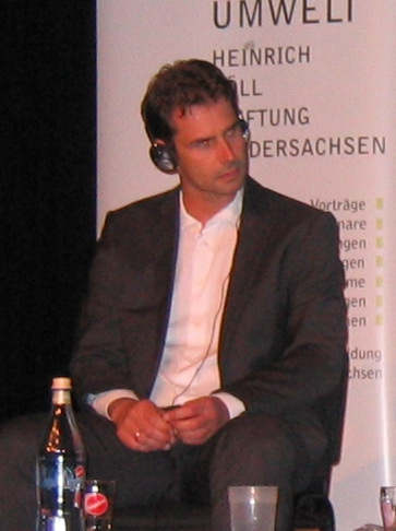 Ralf Kellermann (Trainer der Wölfinnen, VfL Wolfsburg), Foto: Gunda-Werner-Institut (Ausschnitt)